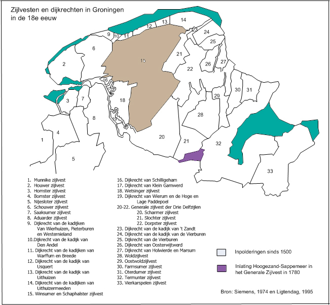 Kaart met de omvang van zijlvesten en dijkrechten in de provincie Groningen omstreeks 1750. De kaart is door mij getekend naar de kaarten aanwezig bij Siemens (1974) en Ligtendag (1995)